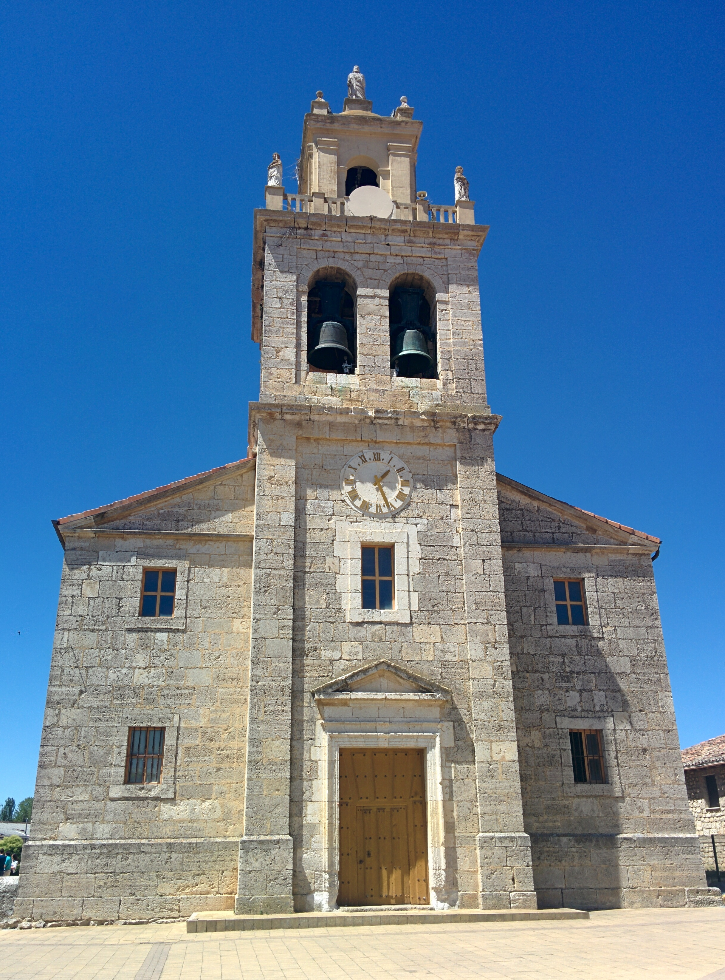 Iglesia de San Facundo y San Primitivo, en Las Quintanillas (Burgos, España).